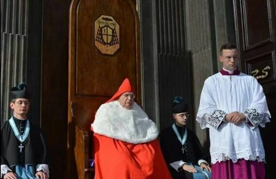 Fotografía del cardenal Raymond Burke